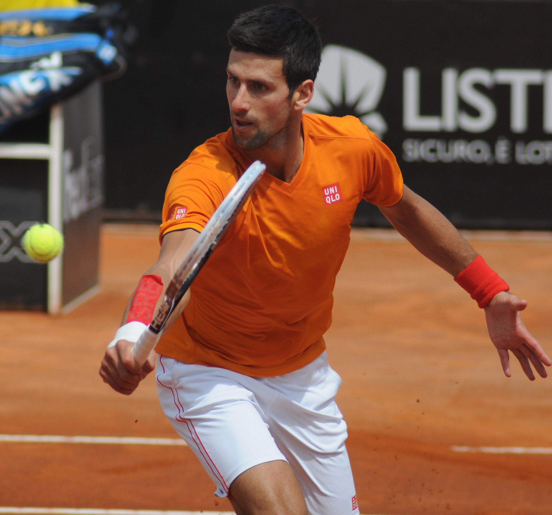 Novak Đoković at the 2014 Internazionali BNL d'Italia